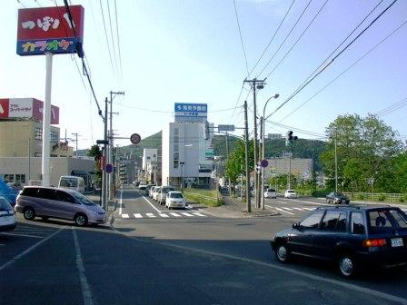 川沿7条付近